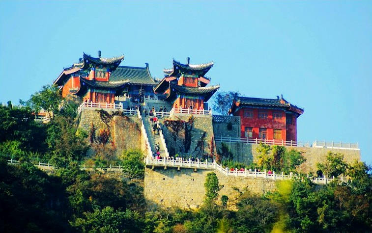 Yuntai mountain